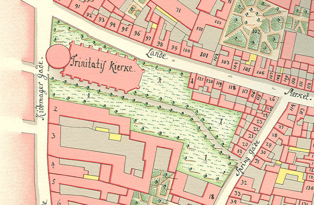 Trinitatis Kirke, Copenhagen, Denmark. Udsnit af Geddes kort over Rosenborg kvarter 1757.